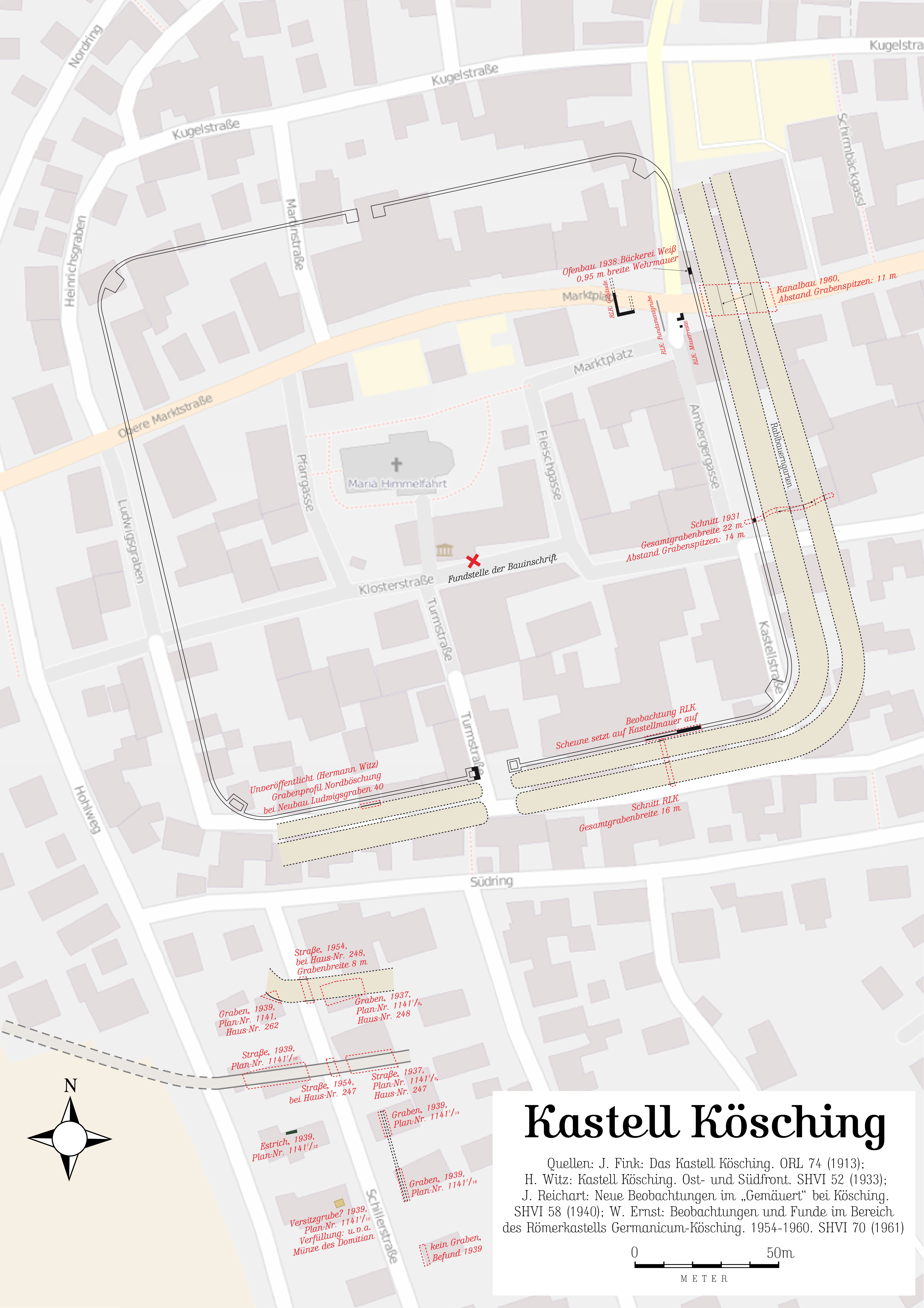 Kastell Kösching nach den Grabungs- und Beobachtungsbefunden bis 1960. Die Quellen sind in der Datei direkt angegeben.